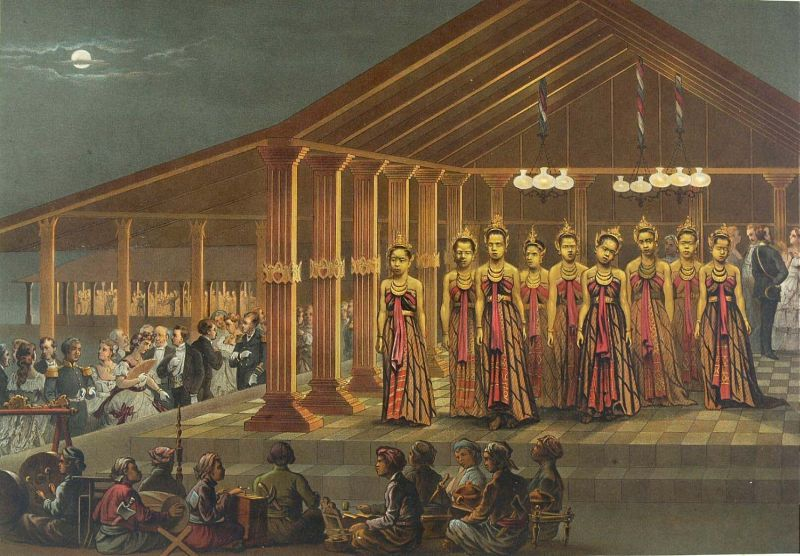 Litho. De litho is gemaakt naar een tekening van F.C. Wilsen. Pagina 7 van de map "De Indische Archipel", Den Haag, 1865-1876, met daarin 24 kleurenlitho's, van objectnr. 3728-430 t/m 3728-479.. Bedoyo danseressen aan het hof van de sultan van Yogyakarta